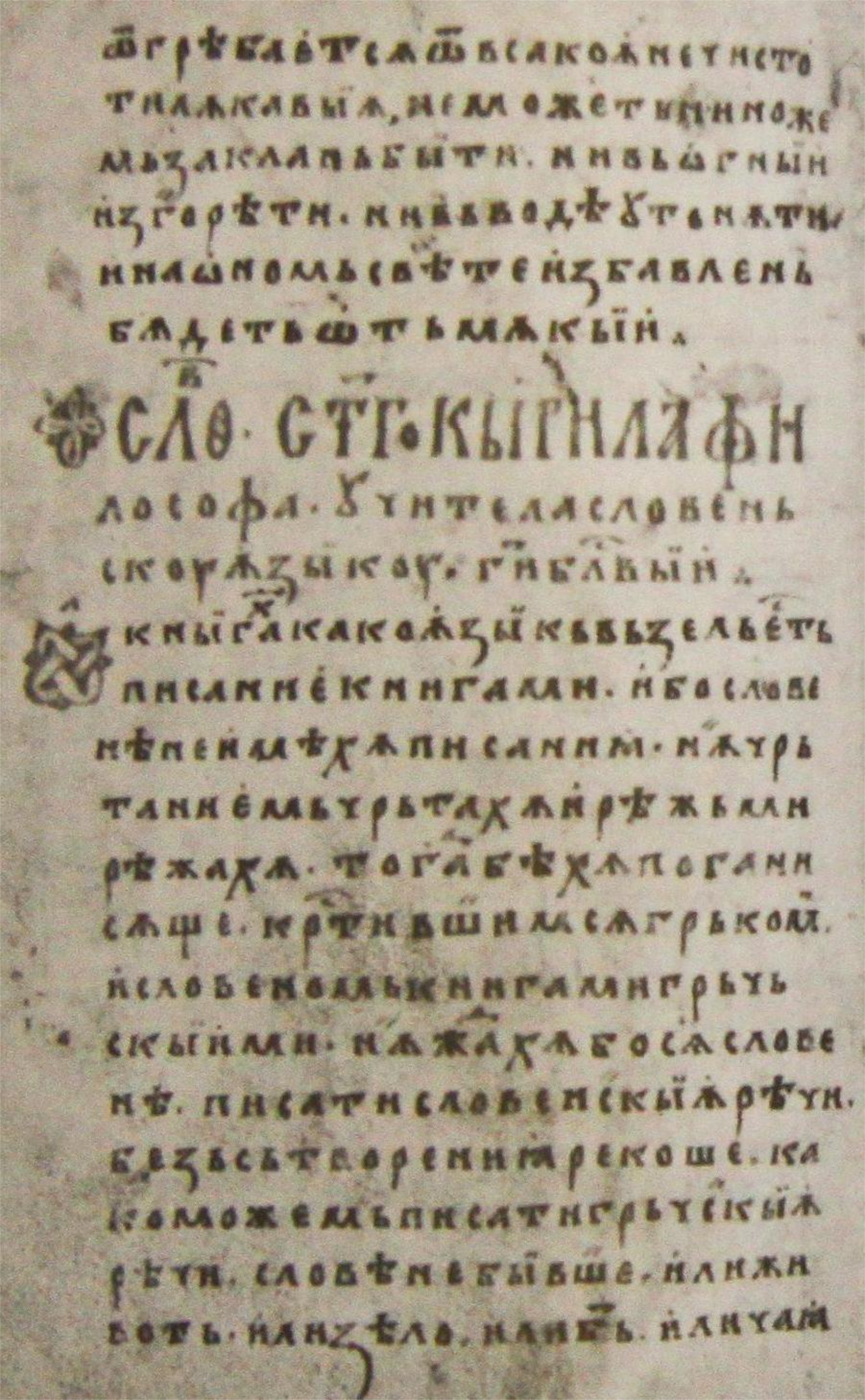 Берлински сборник